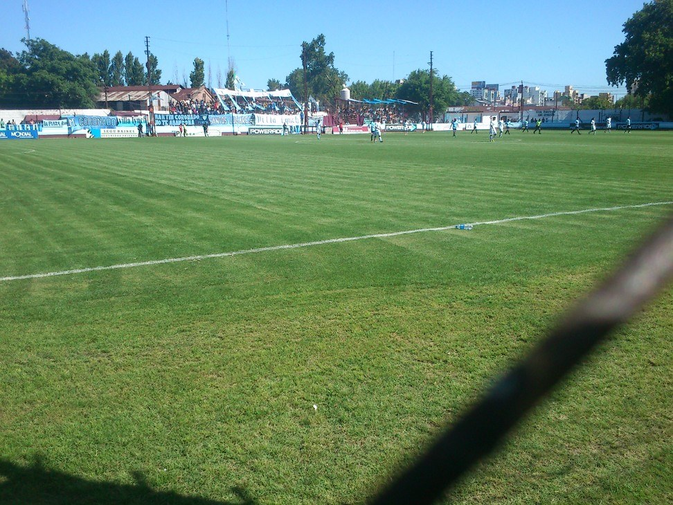 estadio ferrocarril urquiza